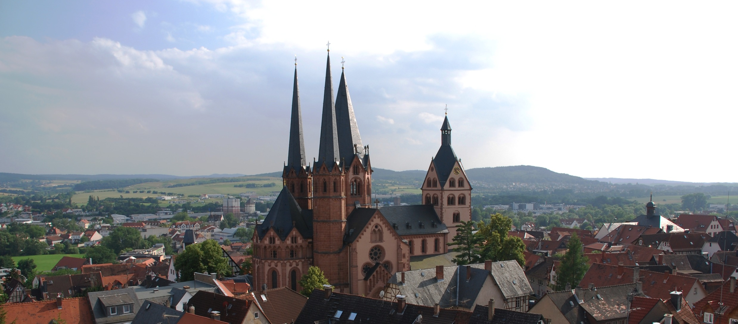 Ansicht von Gelnhausen, die Evangelische Marienkirche in der Bildmitte